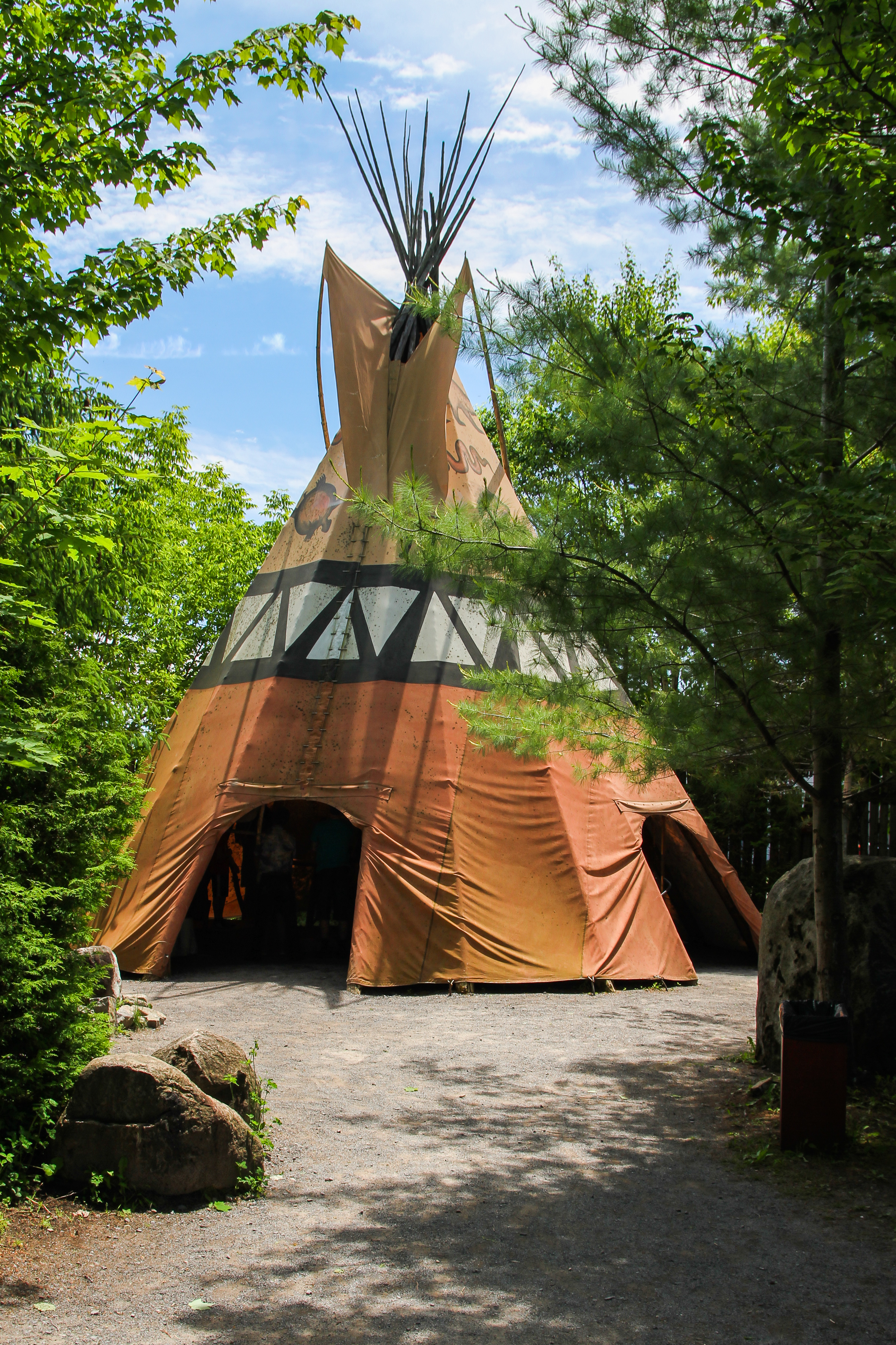 Tee-pee géant sur le site traditionnel huron Onhoüa chetek8e, Wendake